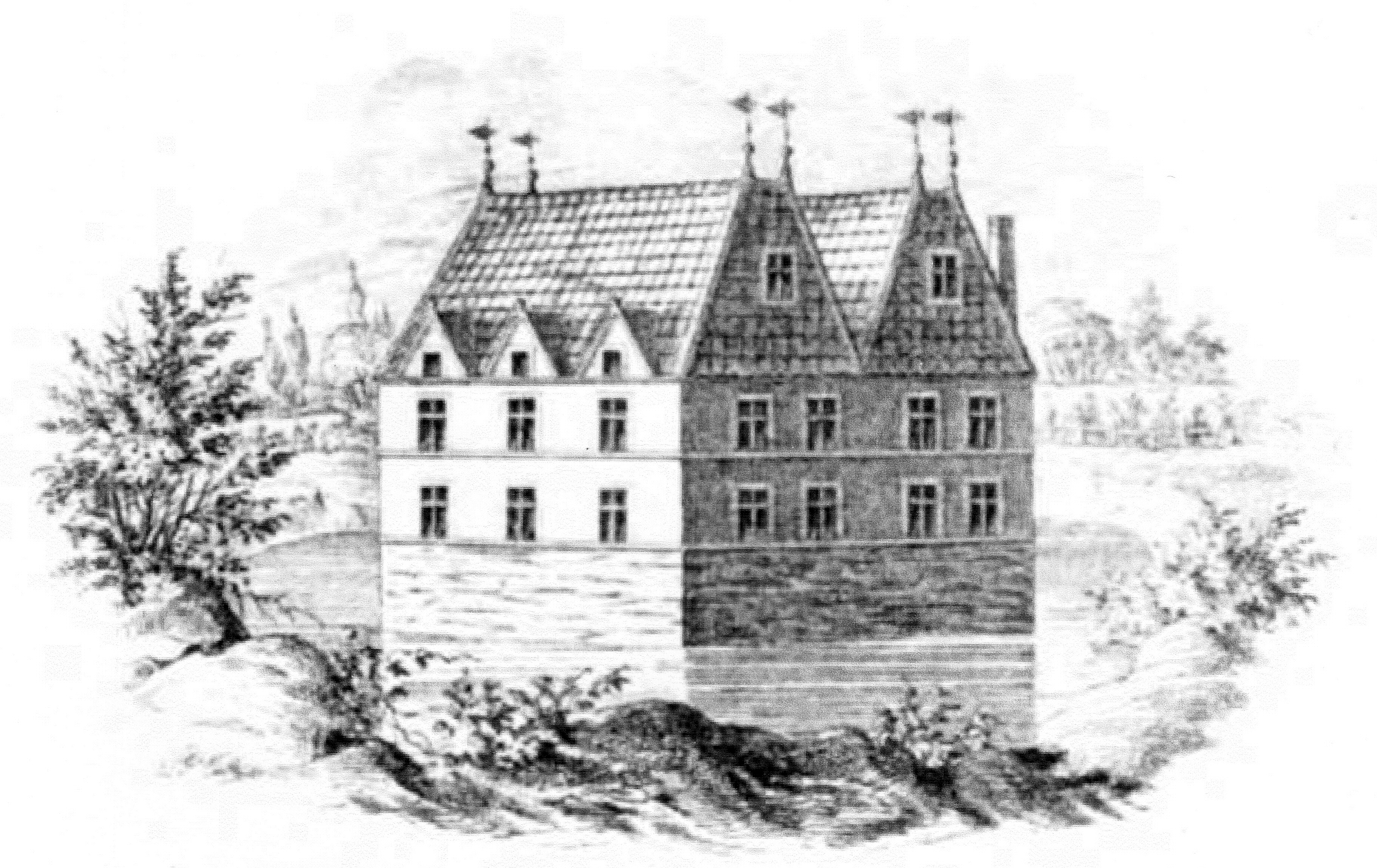 Gut Brodau (auch: Brodowe, Prodendorp, Zeichnung von Köhler und Roisternitz 1862